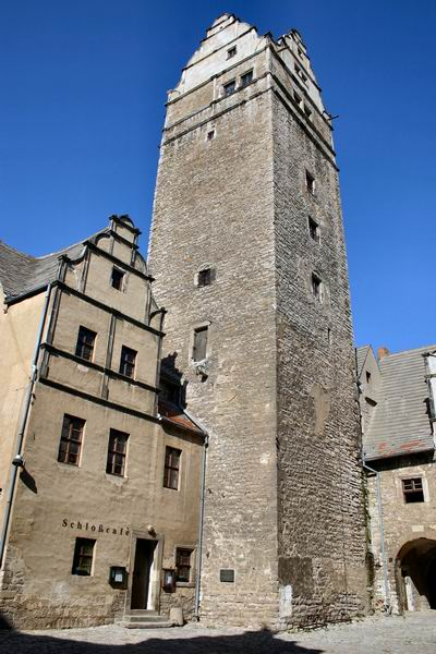 Schloss Plötzkau, Bergfried; eigenes Foto von 2005, public domain